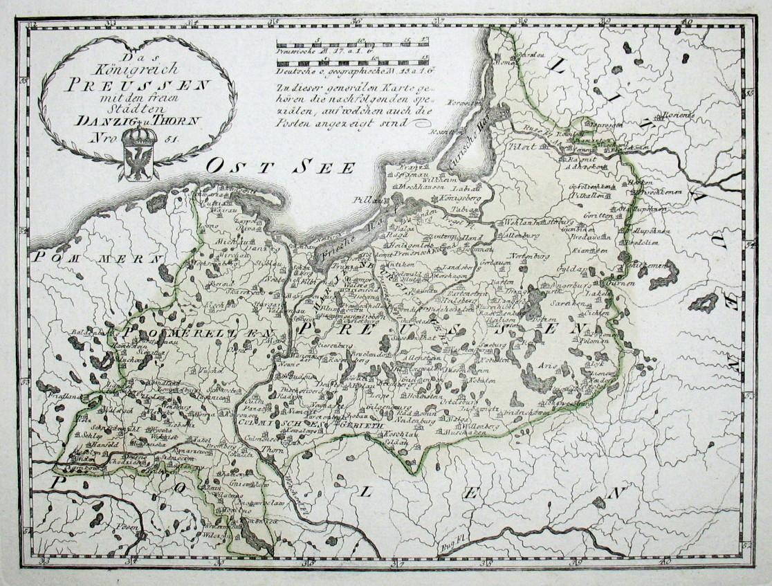 Das Königreich Preussen mit den freien Städten Danzig u. Thorn. Nro. 051. Kolorierter Kupferstich